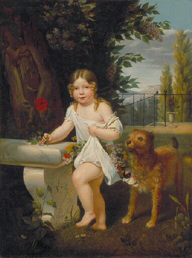 Li ho colti per mio papà, olio su tela, 129.5 x 96.5 cm, Mâcon, Musée des Ursulines